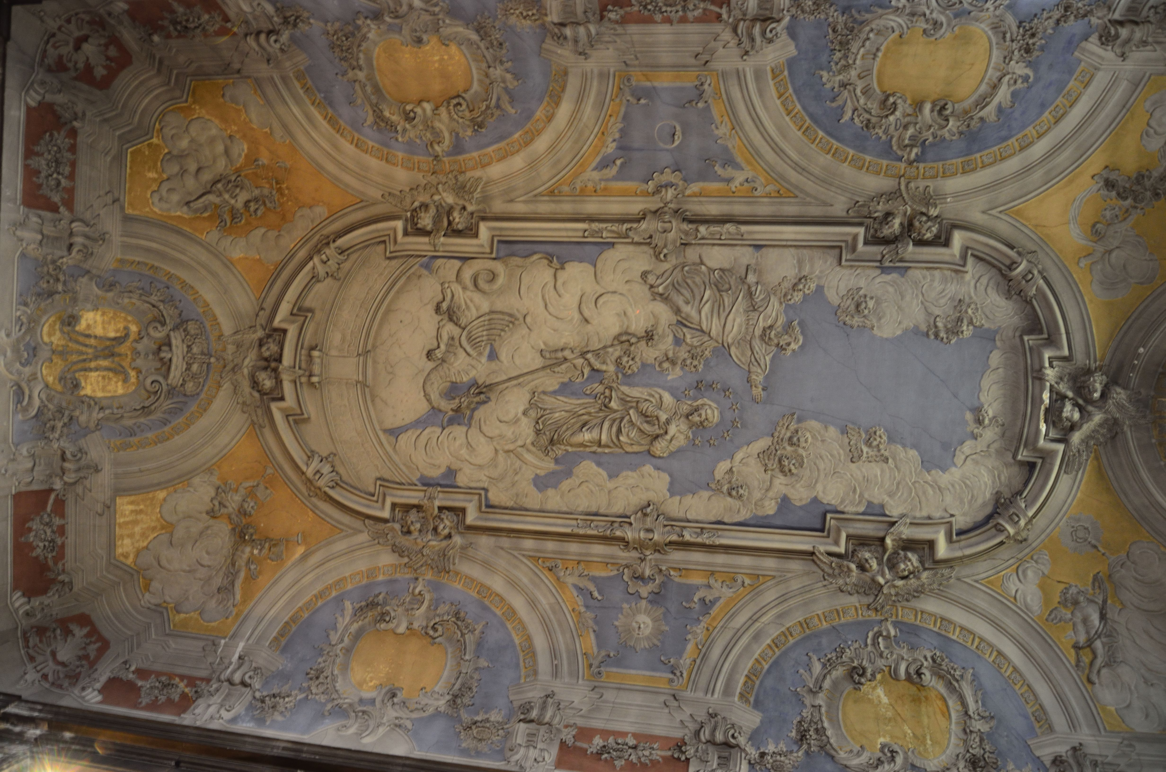 Pintura do tecto da Igreja